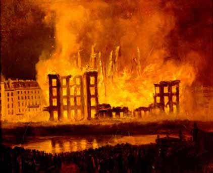 Der Brand des Treumann-Theaters (Kaitheater) in Wien, 1863, Öl auf Leinwand, 37,5 x 45 cm, signiert verso: L. Munsch, Theaterwissenschaftliche Sammlung der Universität zu Köln (Schloss Wahn), Inv.-Nr. 41188 (Sammlung Niessen)